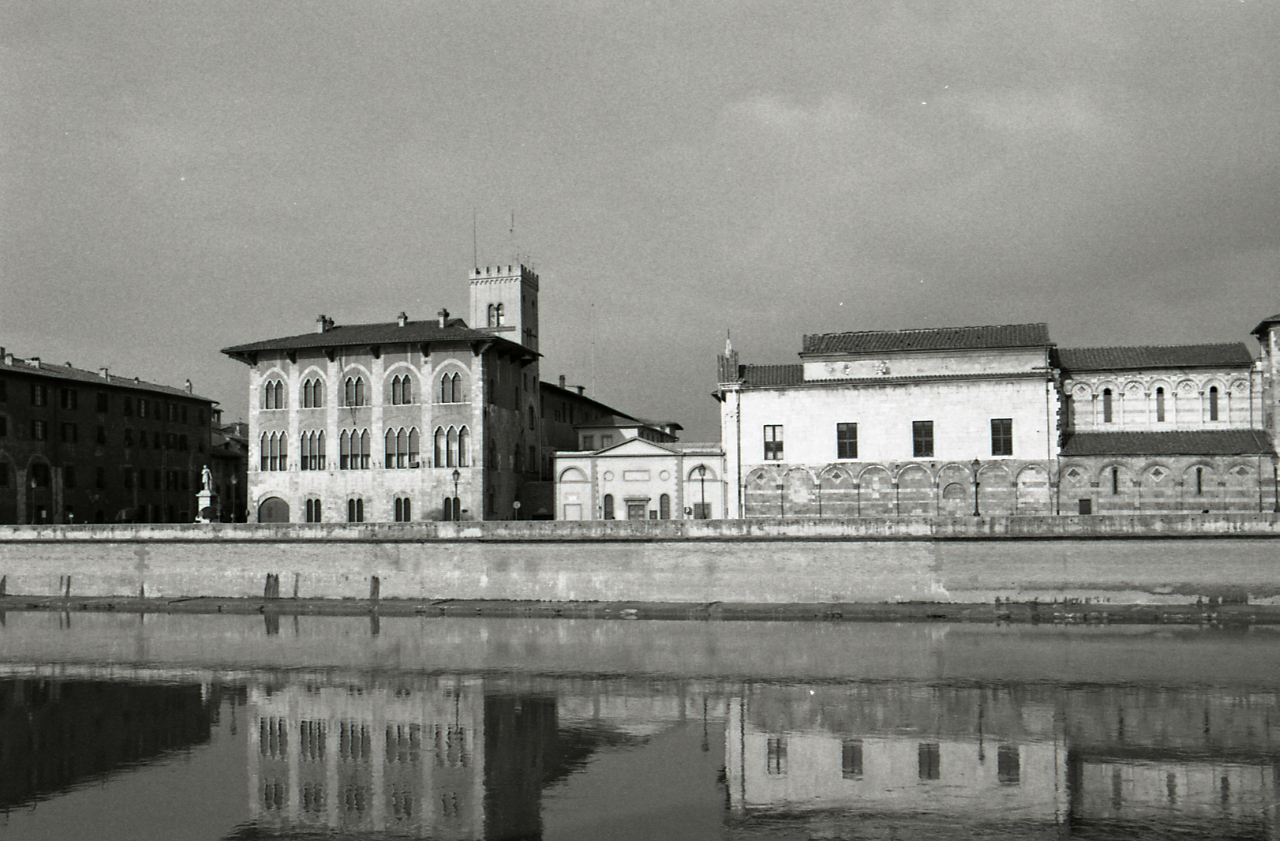 Pisa. Centro storico: vedute urbane lungo il fiume Arno. (Lungarno Mediceo) Servizio fotografico : Pisa, 1973 / Paolo Monti. - Strisce: 7, Fotogrammi complessivi: 37 : Negativo b/n, gelatina bromuro d'argento/ pellicola ; 35 mm. - ((Sul portanegativi: N[I]K[MA]T FP4. - All'interno del portanegativi: alcuni fotogrammi sono contrassegnati. - Occasione: Documentazione per la pubblicazione: Università di Pisa, "I contenuti formativi della città ambientale: ricerca sui problemi di insediamento dell'Università di Pisa", Pisa, Pacini, 1974. - Fonte: Agenda di Paolo Monti: Leica 1501-3000 Controllo numerazione (1950-1978), presso Archivio Paolo Monti. - Fonte: Monografia di Università di Pisa: I contenuti formativi della città ambientale: ricerca sui problemi di insediamento dell'Università di Pisa, Pisa, Pacini (1974). - Fonte: Fattura di Paolo Monti: IV. Commesse/ Fattura n. 10 (1974/05/16), presso Archivio Paolo Monti